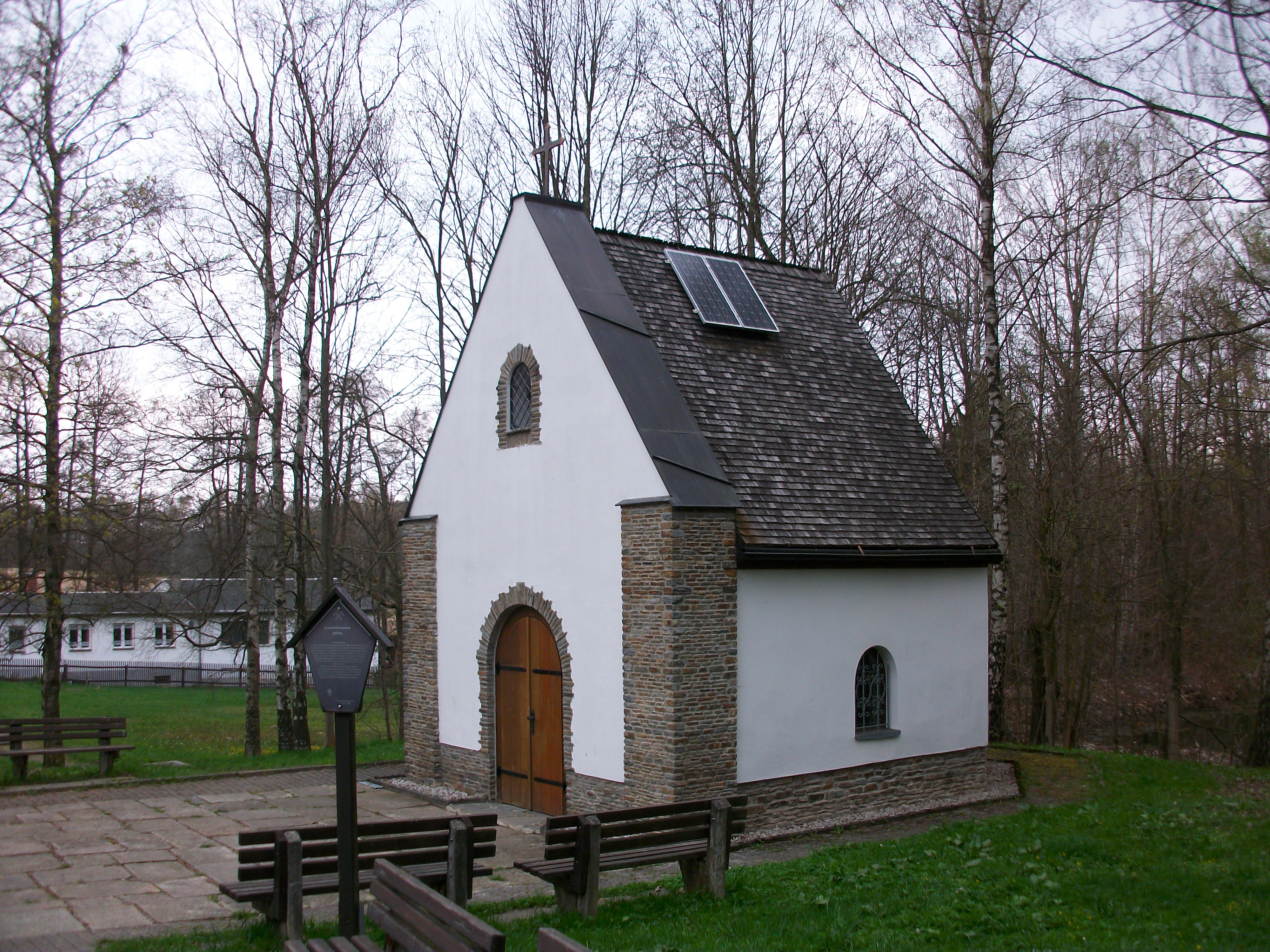 Zwönitz Kapelle St. Anna (2017)